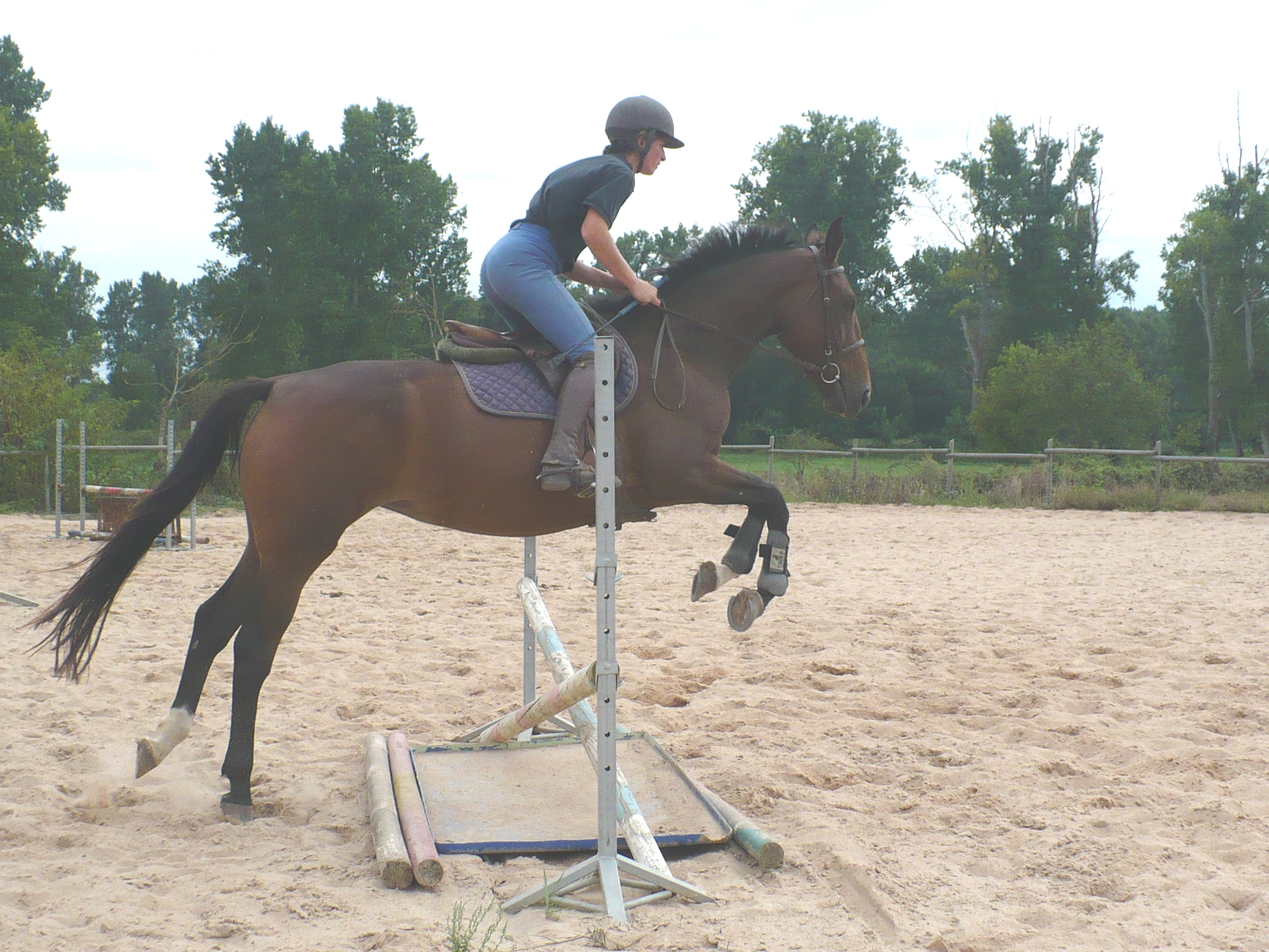 Préparation du jeune cheval au saut d'obstacles. Cette jument de 3 ans se familiarise avec les obstacles de formes différentes, ici un croisillon sur bidet.